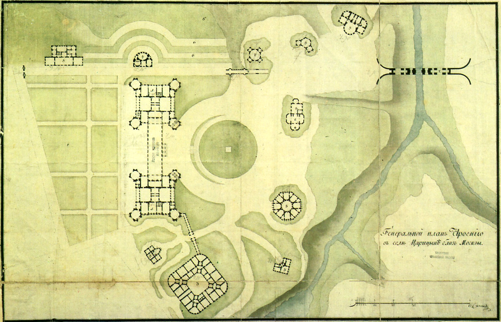 План застройки Царицына с новым Большим Царицынским дворцом